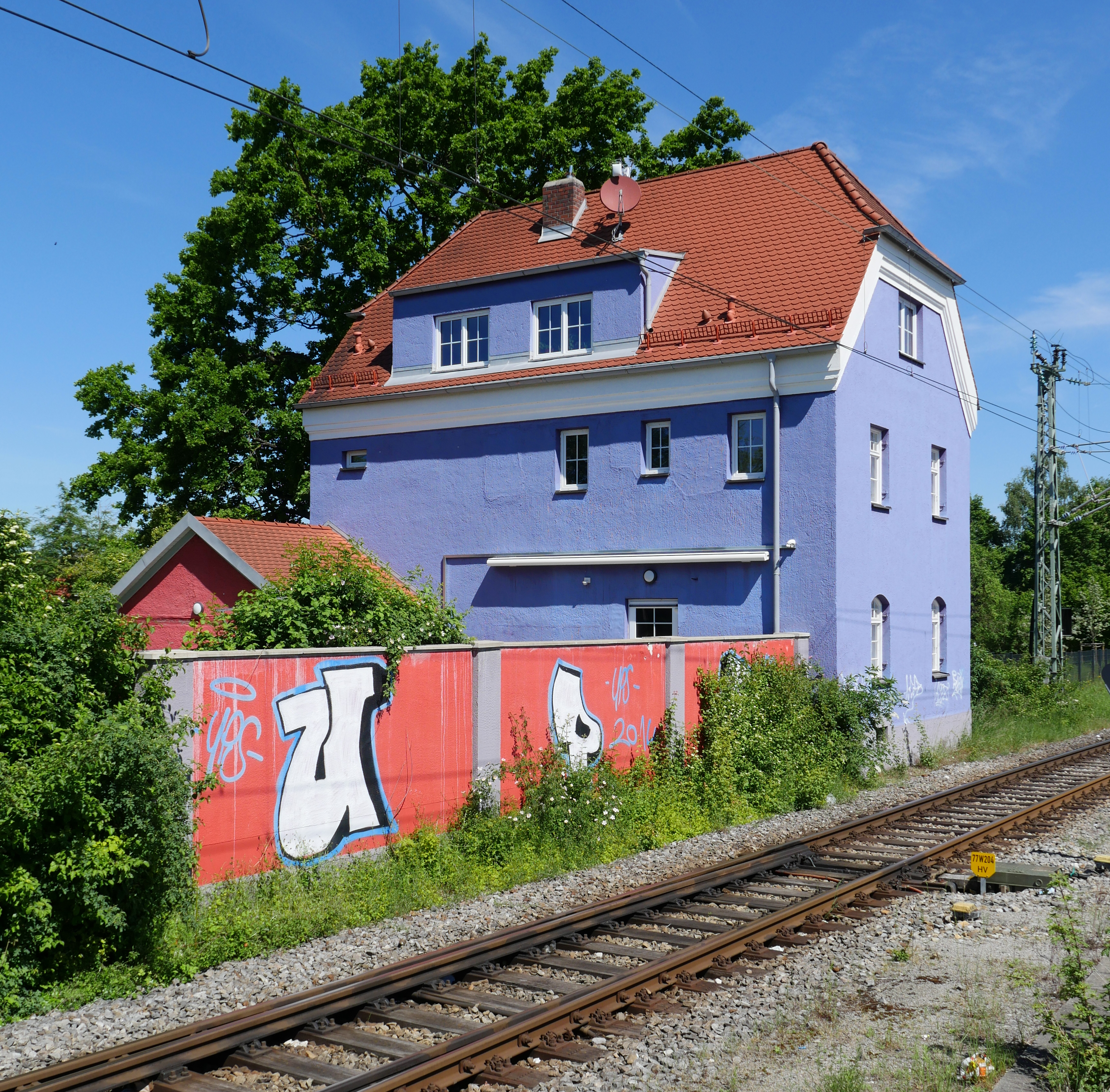 Wohntrakt des ehemaligen Lokschuppens im Bahnhof Herrsching von 1903. Der südlich anschließende Lokschuppen wurde Anfang der 1950er Jahre abgebrochen.